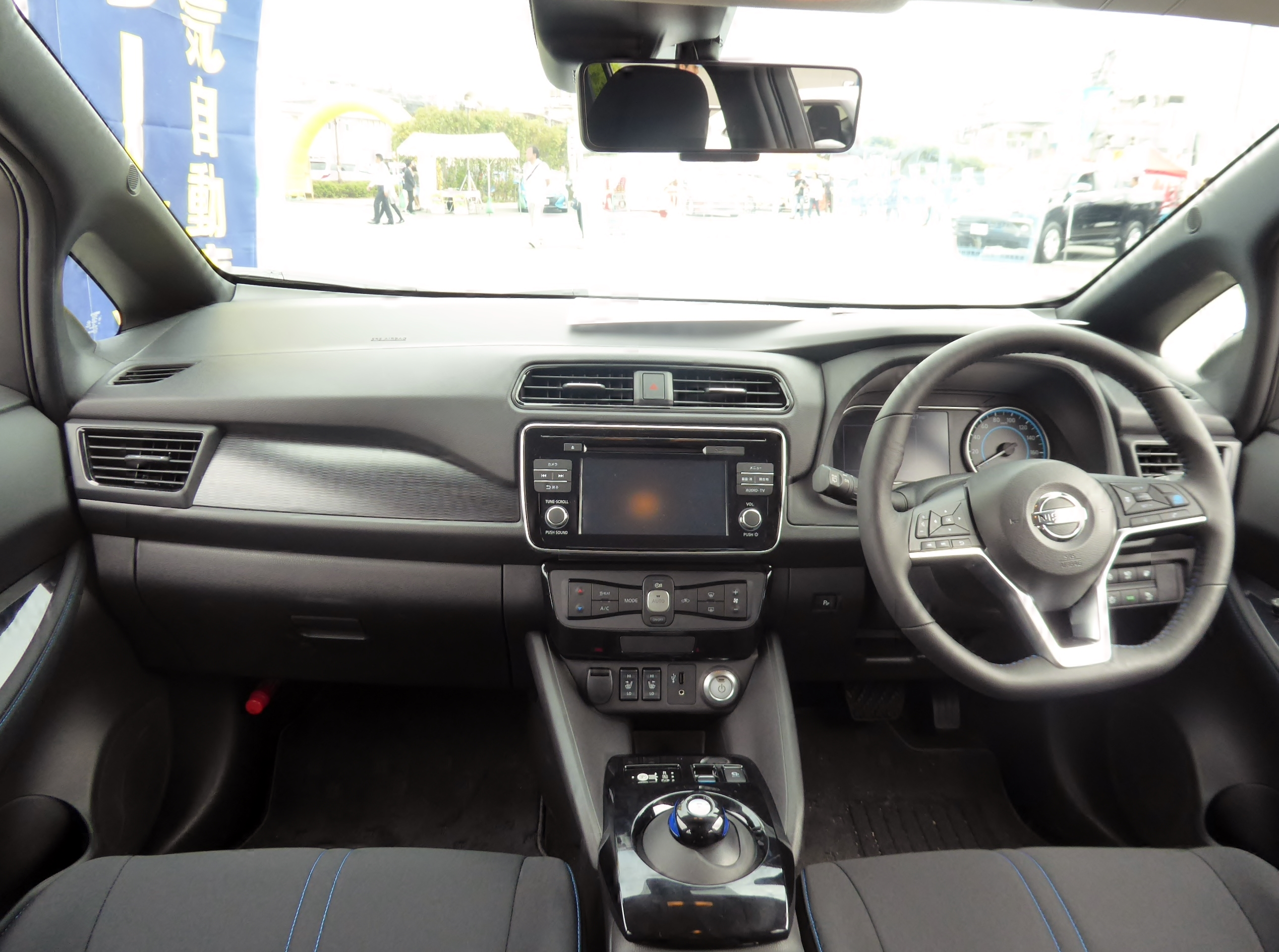 ZAA-ZE1型日産・リーフGのインテリアを撮影。